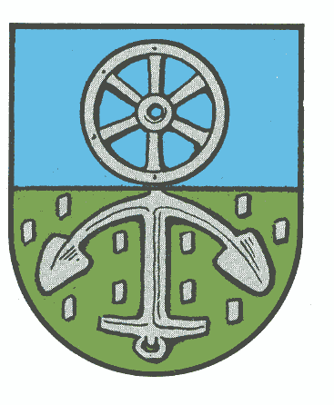 Wappen von Reipoltskirchen